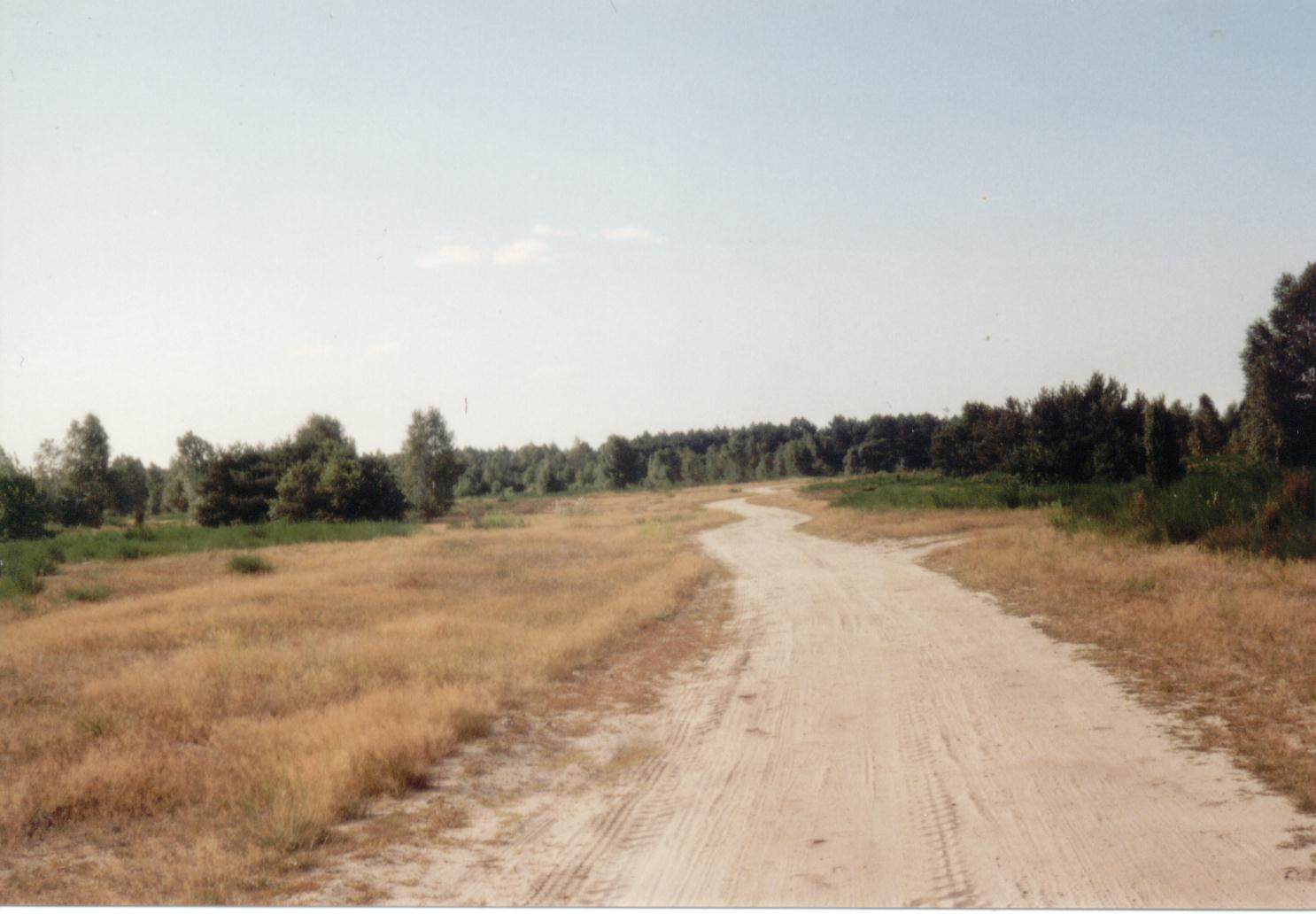 Dawny poligon wojskowy w pobliżu Raducza